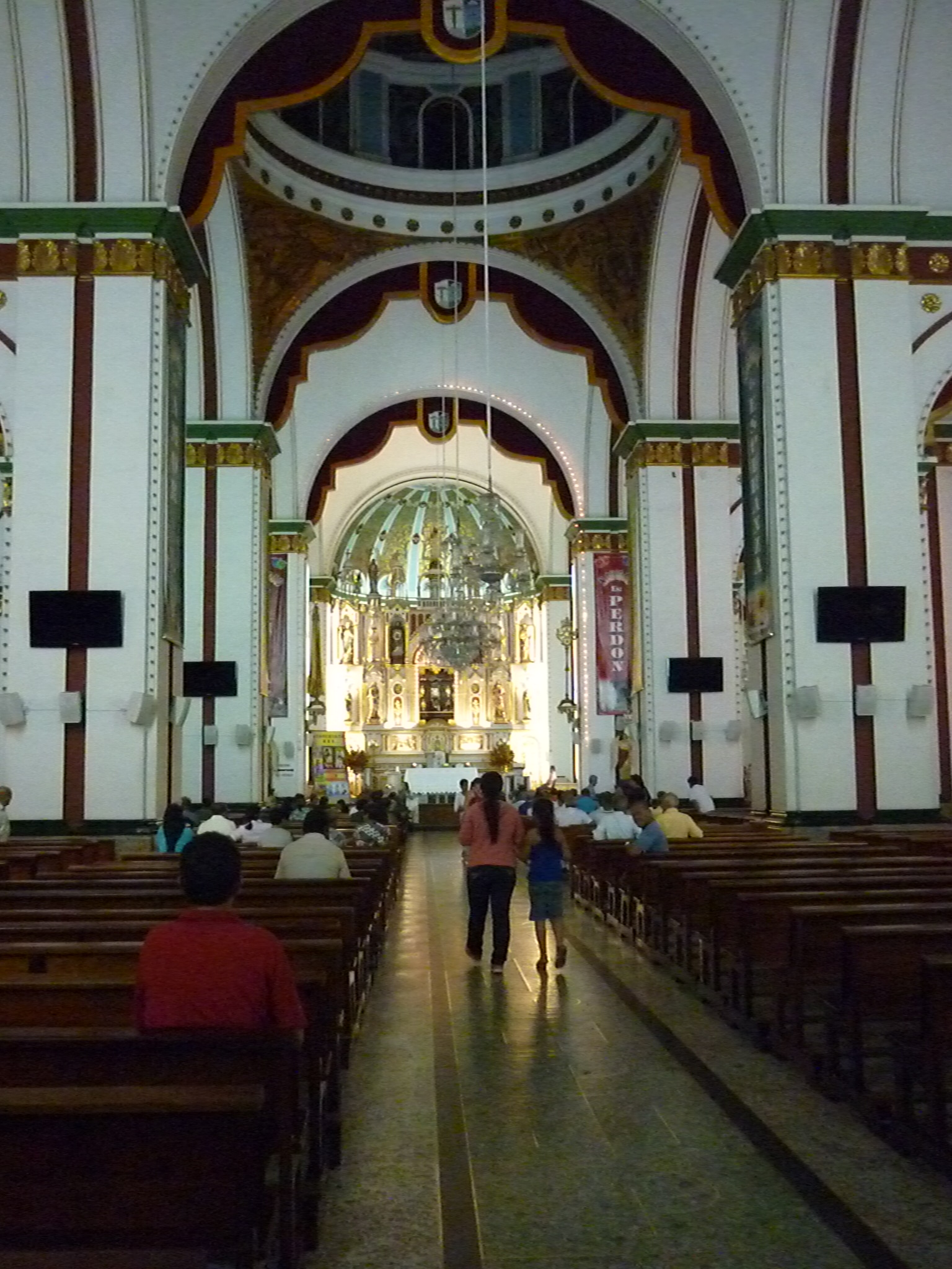 Un amplio y decorado interior de la Basílica Señor de los Milagros se puede observar.